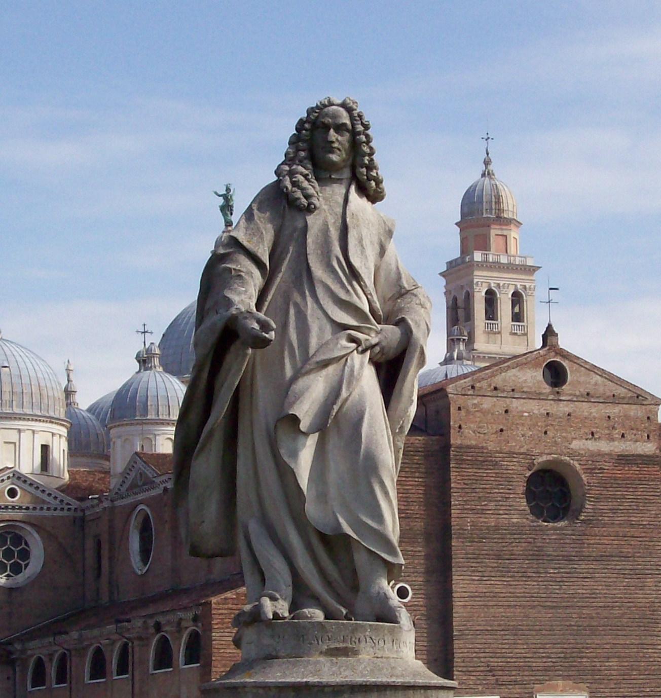 Statua di Nicolò Tron jr a Prato della Valle Padova.